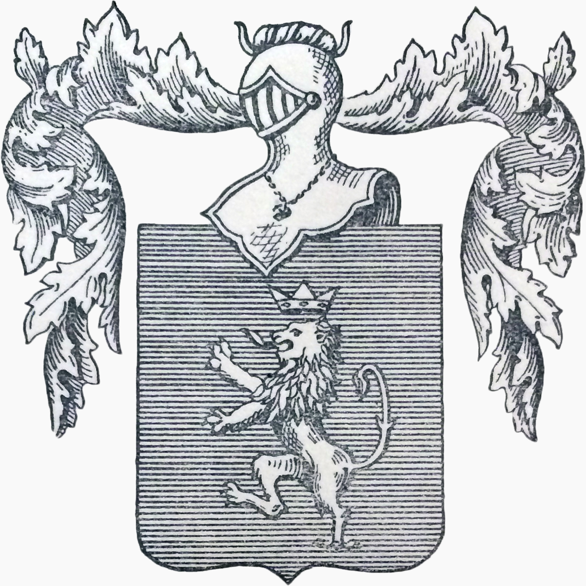 Stemma della Famiglia Ghilini presente nelle "Tavole genealogiche di famiglie nobili alessandrine e Monferrine dal secolo IX al XX" di Francesco Guasco di Bisio. Descrizione dello stemma: d'azzurro, al leone coronato d'argento, armato e linguato di rosso